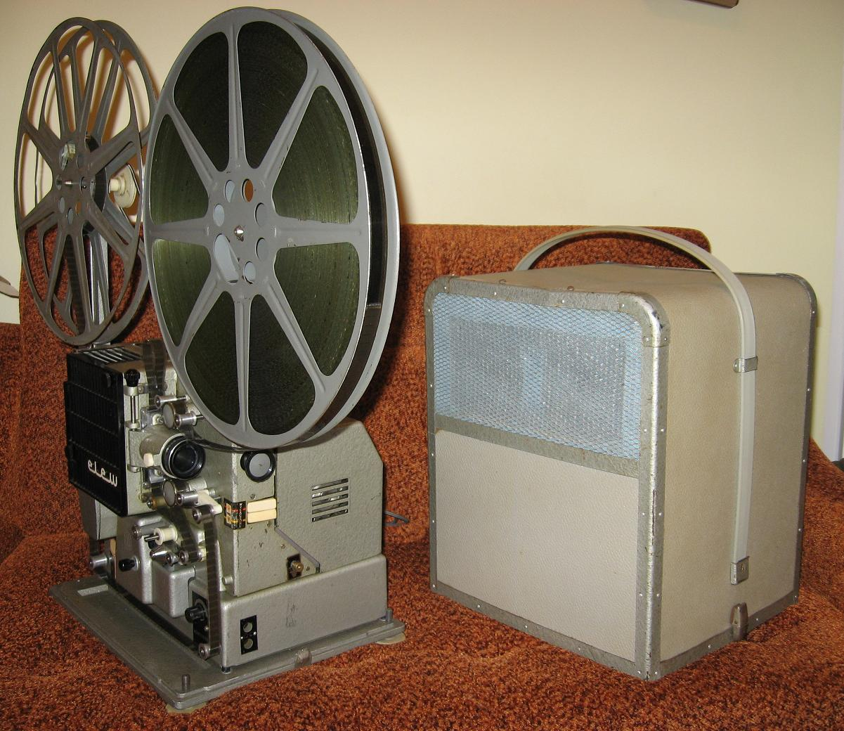 Aparat Projekcyjny AP-22 'ELEW' produkcji zakładów ŁZK, z głośnikami w pokrowcu na projektor. (rok produkcji: 1967)